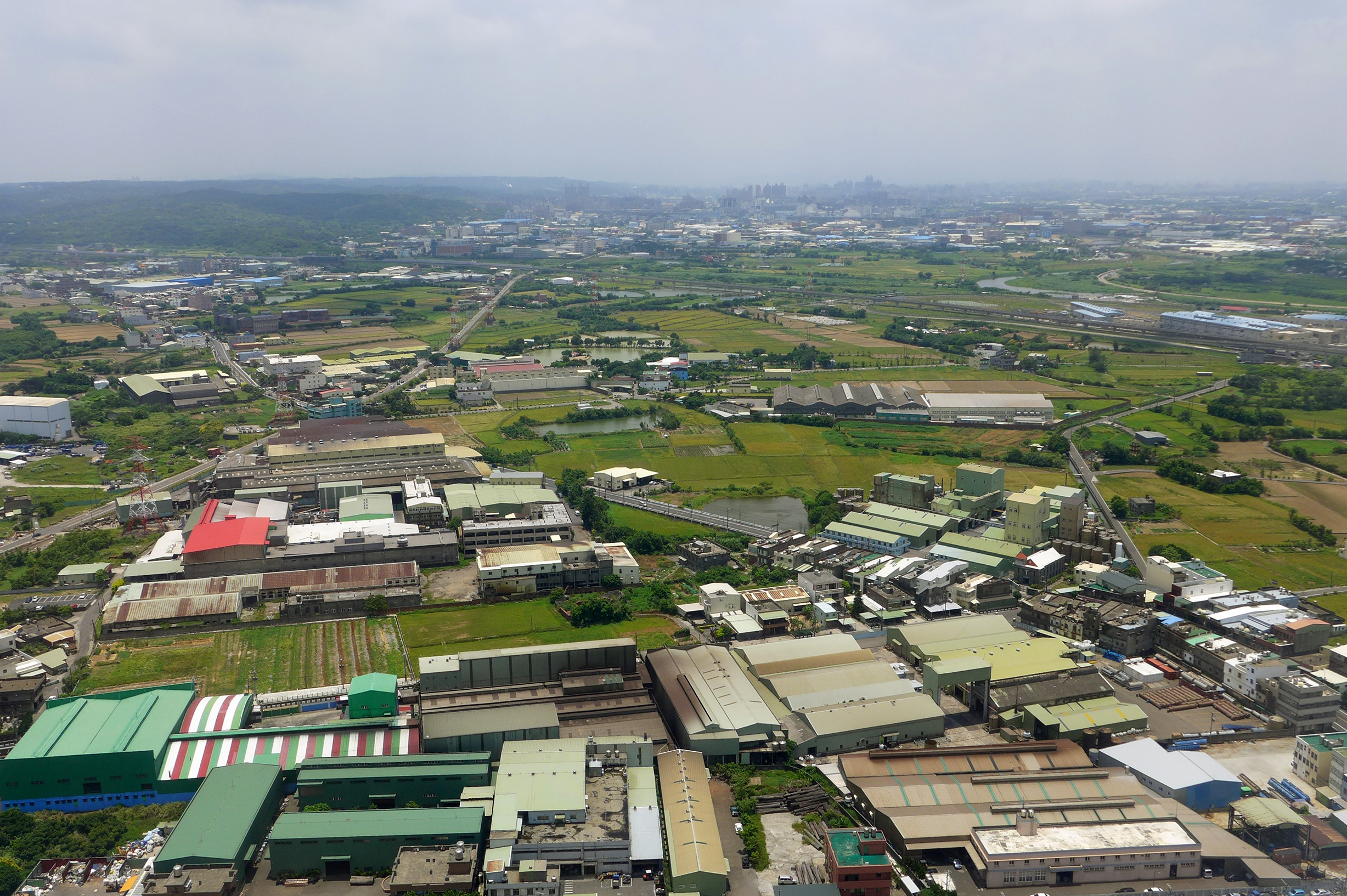 Luzhu District Industrial Area